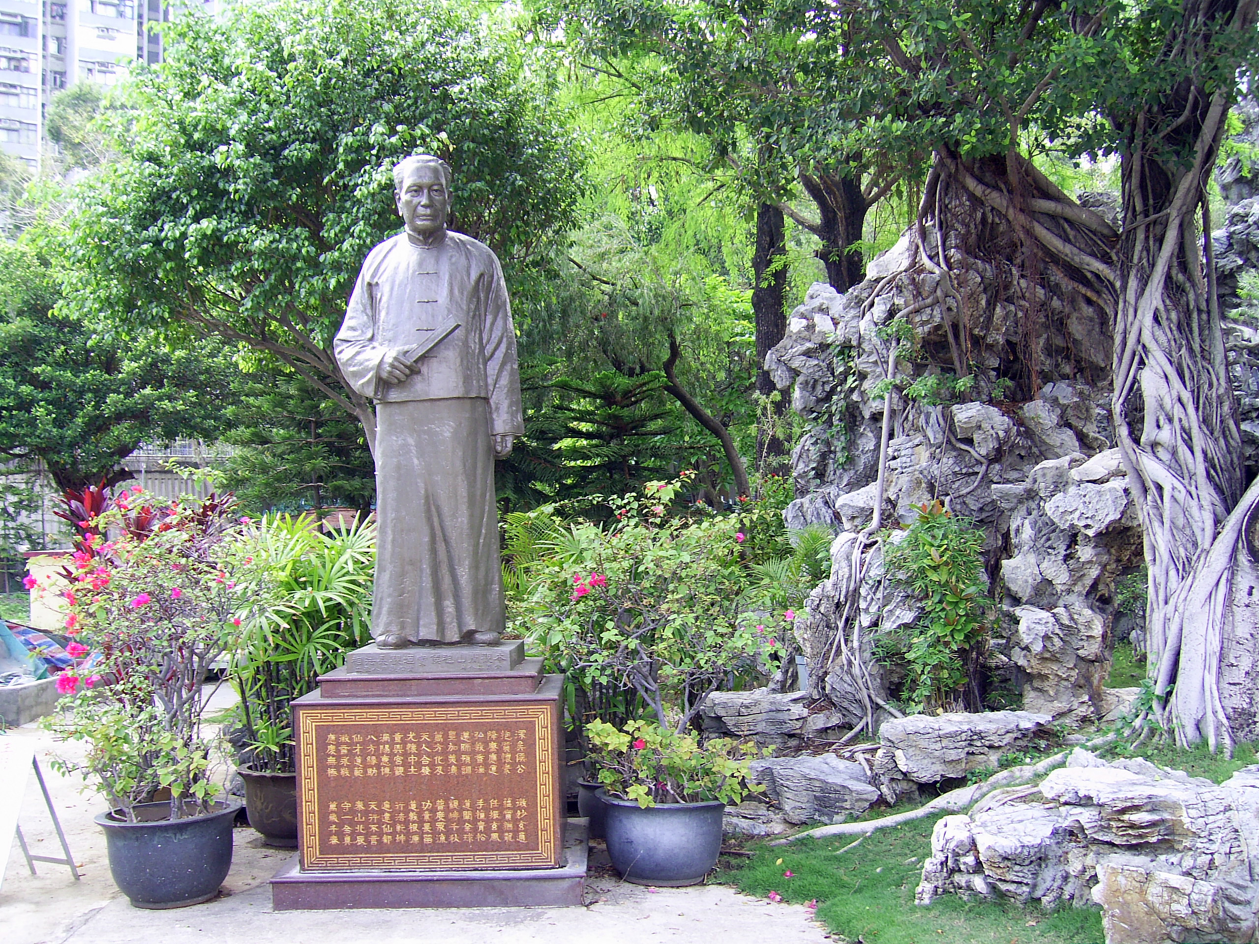 中文（香港）: 青松觀先觀長侯寶垣像